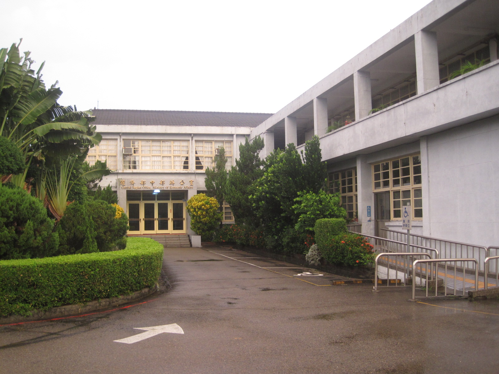 中華民國經濟部中部辦公室，原是臺灣省政府建設廳，南投縣歷史建築。